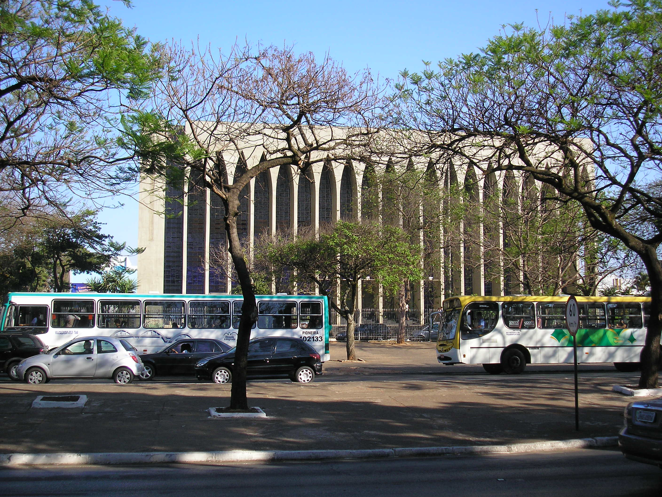 Santuário Dom Bosco, church in Brasilia, Brazil